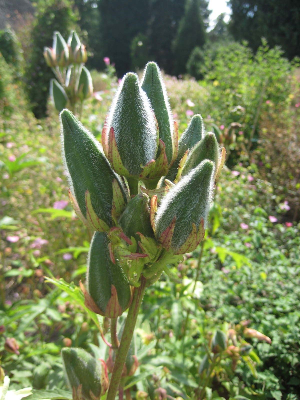 Abelmoschus manihot (Fruchtstand) im Botanischen Garten Dresden